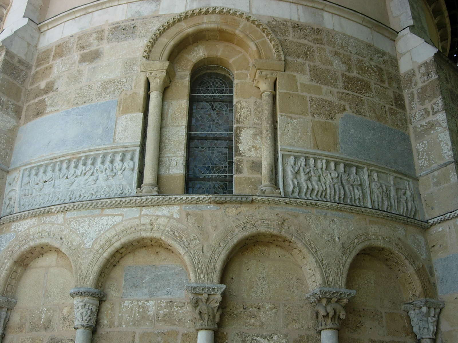 Iglesia Románica del siglo XII de Saint Paul de Dax